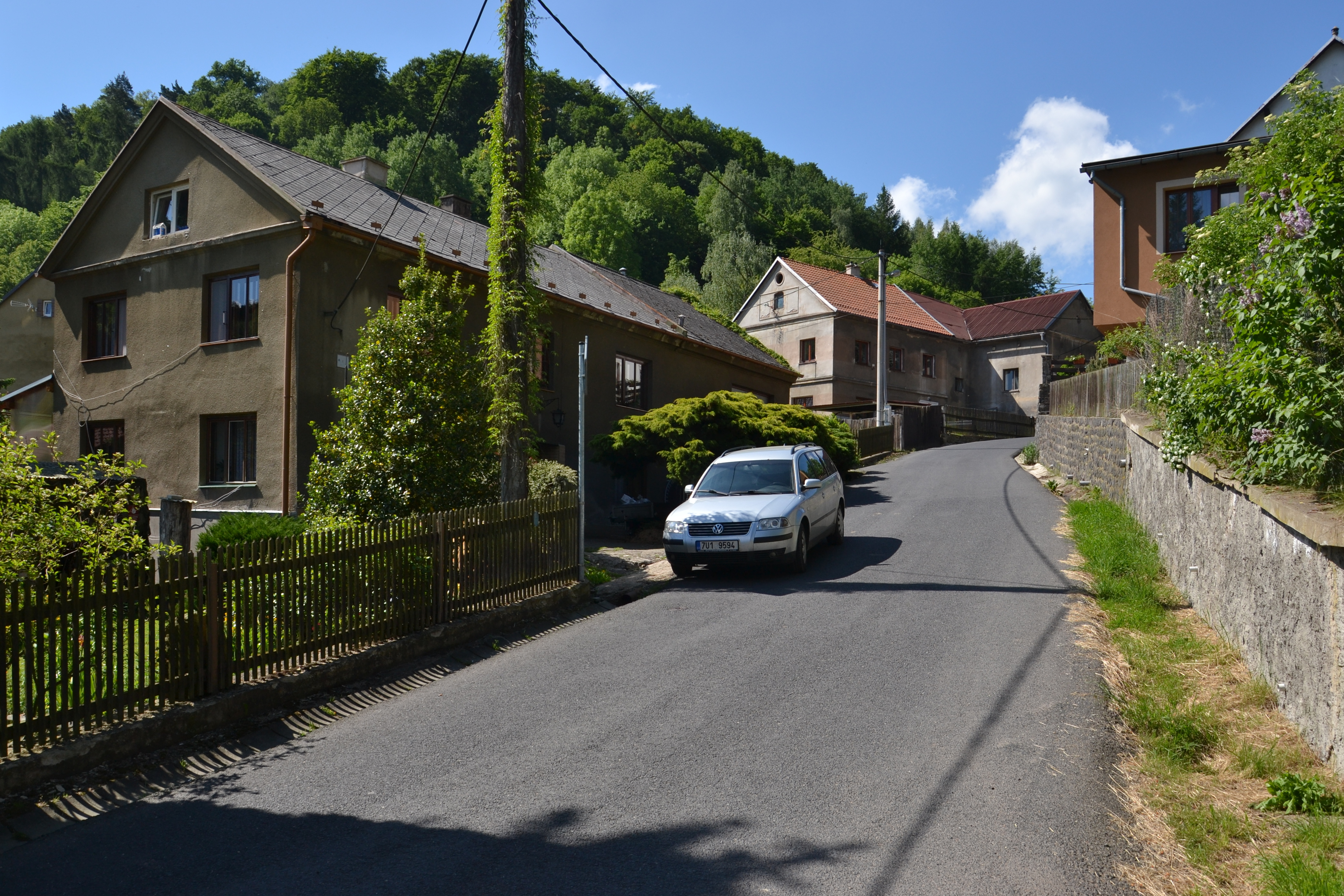 Olešnice – jižní okraj vesnice